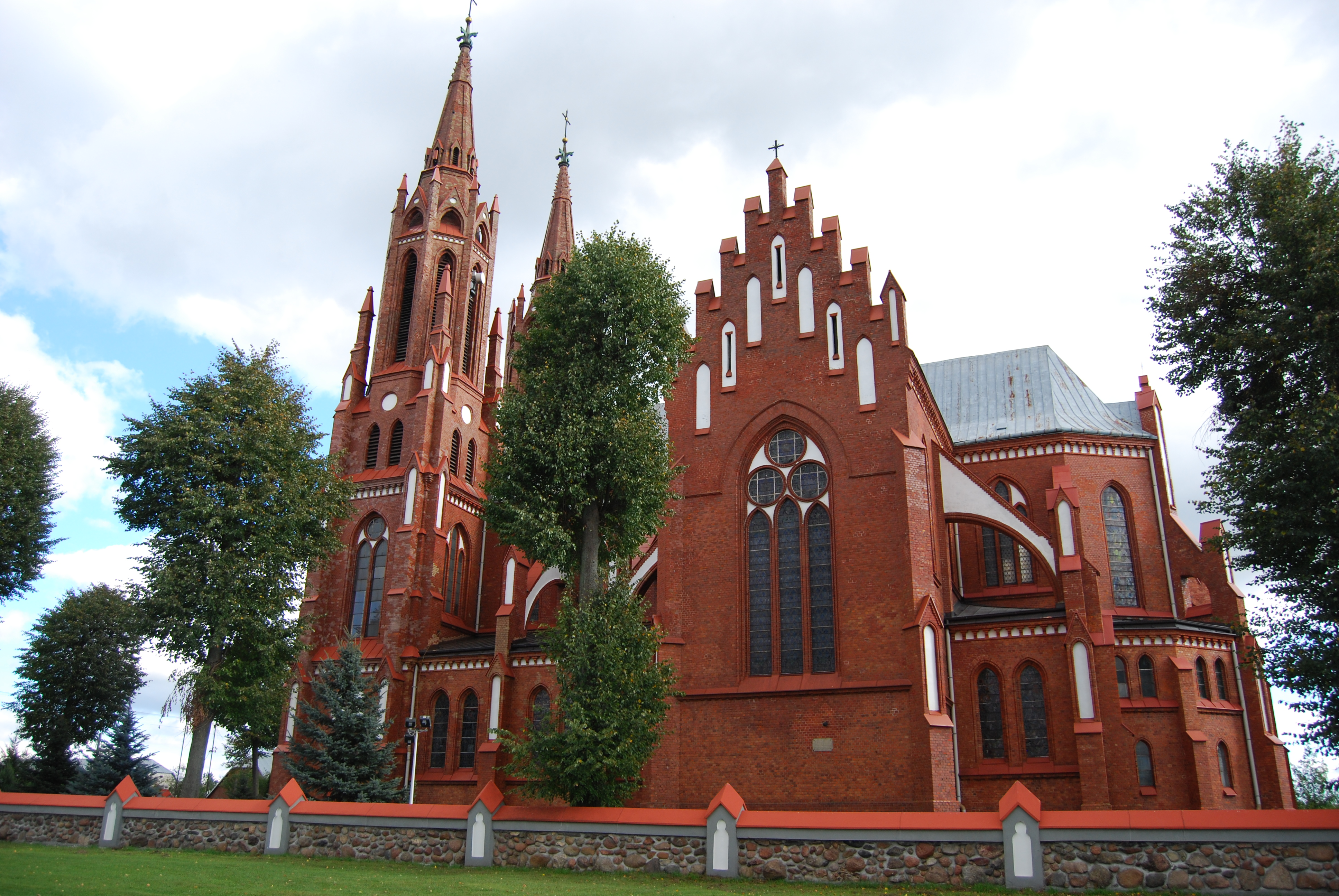 Neogotycki kościół par. p.w M.B.Anielskiej w Lipsku